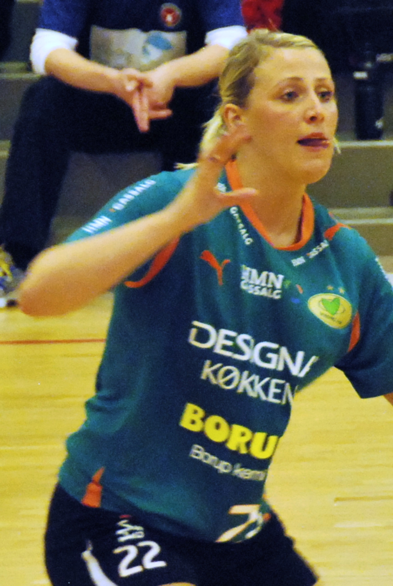 Håndboldspilleren Johanna Ahlm fra Viborg Håndboldklub. Her i Viborg Stadionhal.